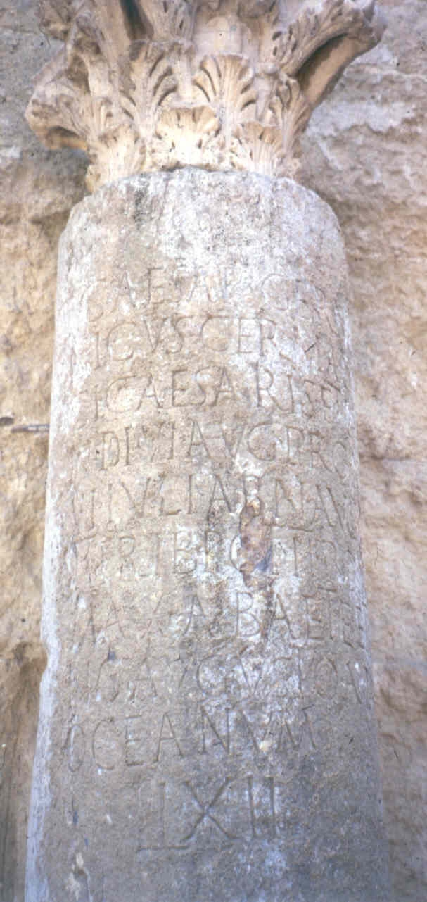 Miliario de Calígula depositado en la Mézquita de Córdoba, procedente de Córdoba, correspondiente con CIL II 6208 = CIL II7 2, cuyo texto dice: C(aius) Caesar Germa/nicus Germani/ci Caesaris f(ilius) Ti(beri) Aug(usti)/ n(epos) divi Aug(usti) pron(epos) divi/ Iuli abn(epos) Aug(ustus) p(ater) p(atriae) co(n)s(ul) II/ imp(erator) trib(unicia) pot(estate) II pont(ifex)/ max(imus) a Baete et Ia/no Augusto ad/ Oceanum/ LXII